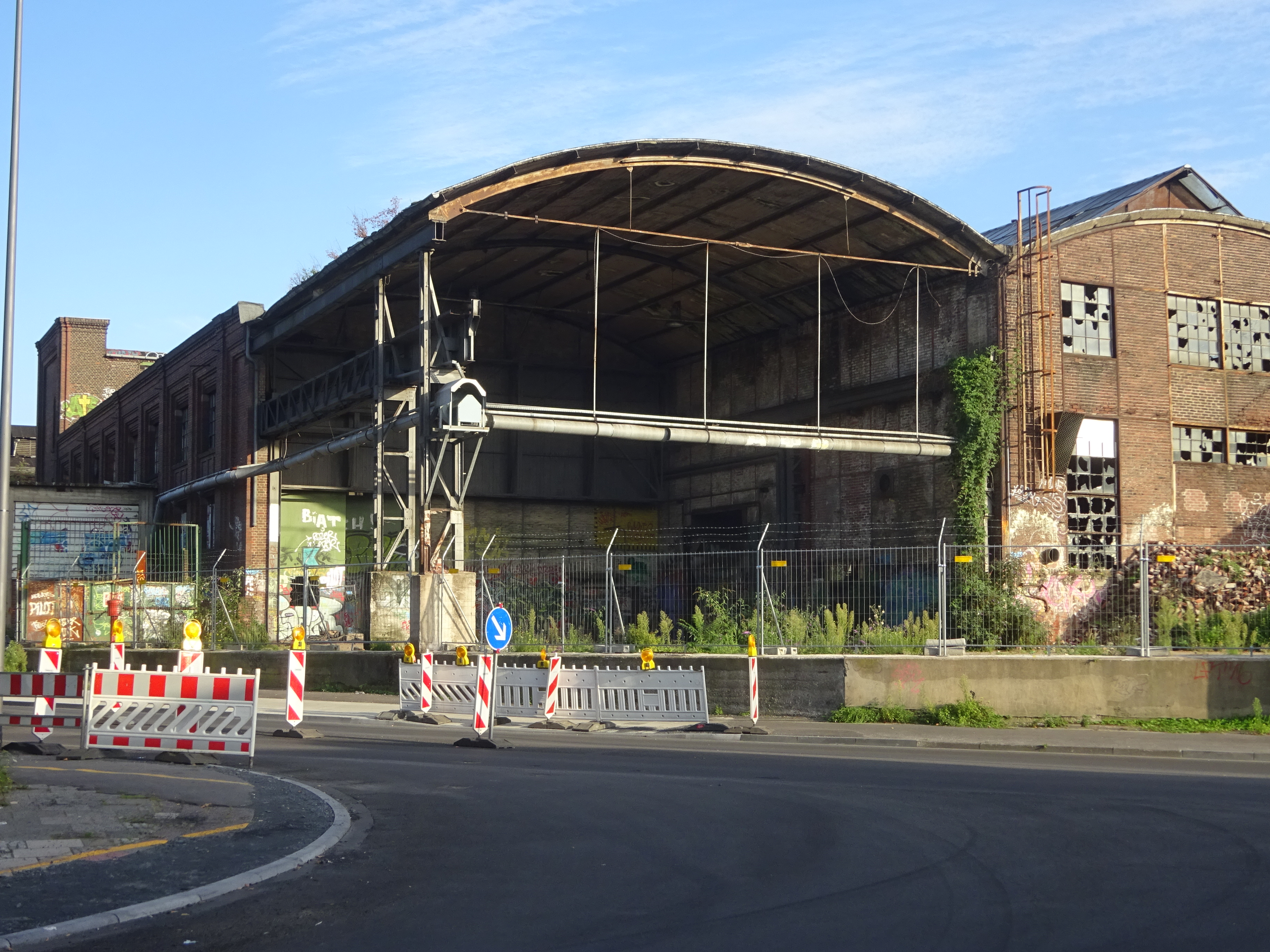 GFD Giesserei